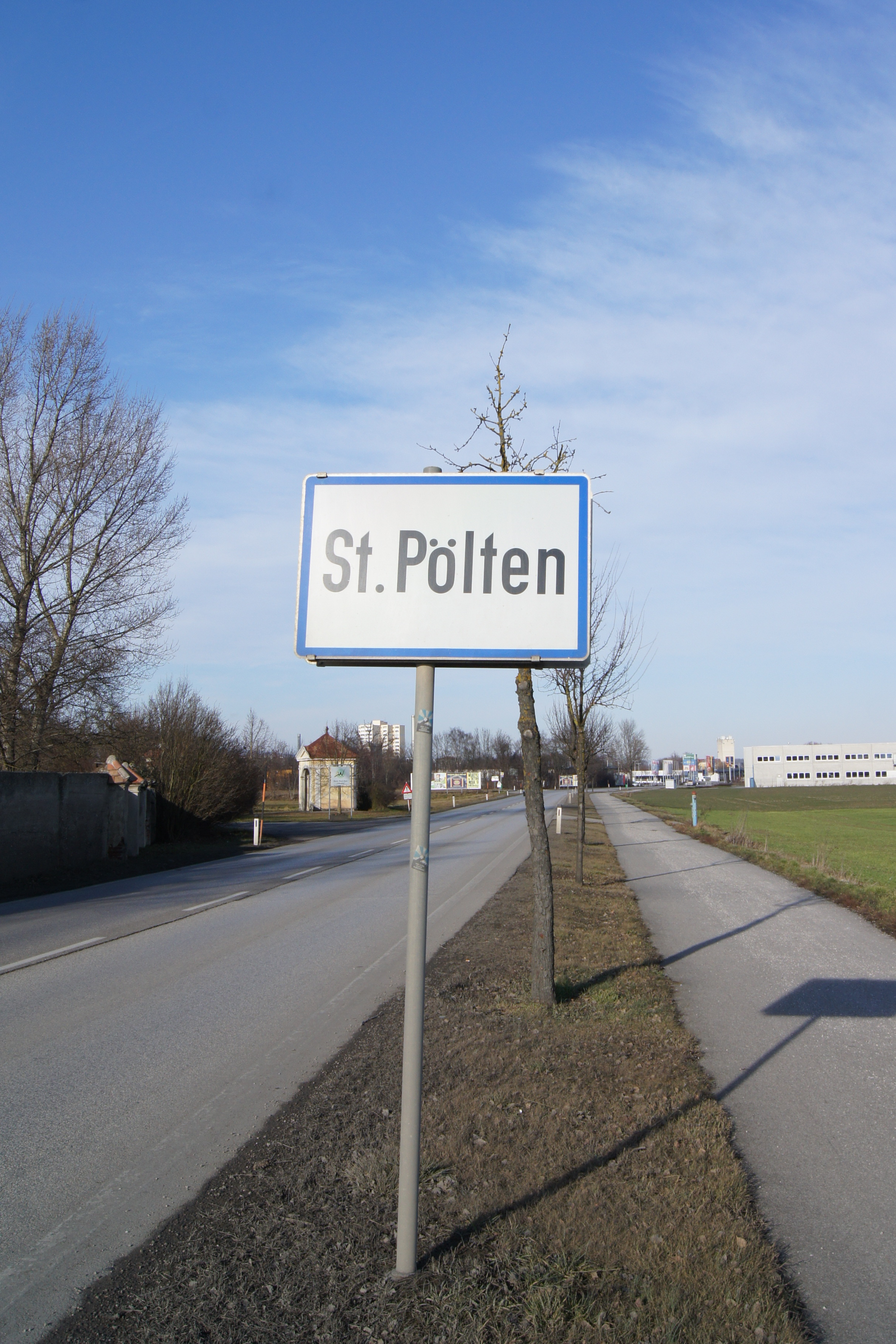 Ortstafel St. Pölten an der Stattersdorfer Hauptstraße. Links liegt der Lilienhof, rechts der "Tramway Trasse" genannte Radweg.